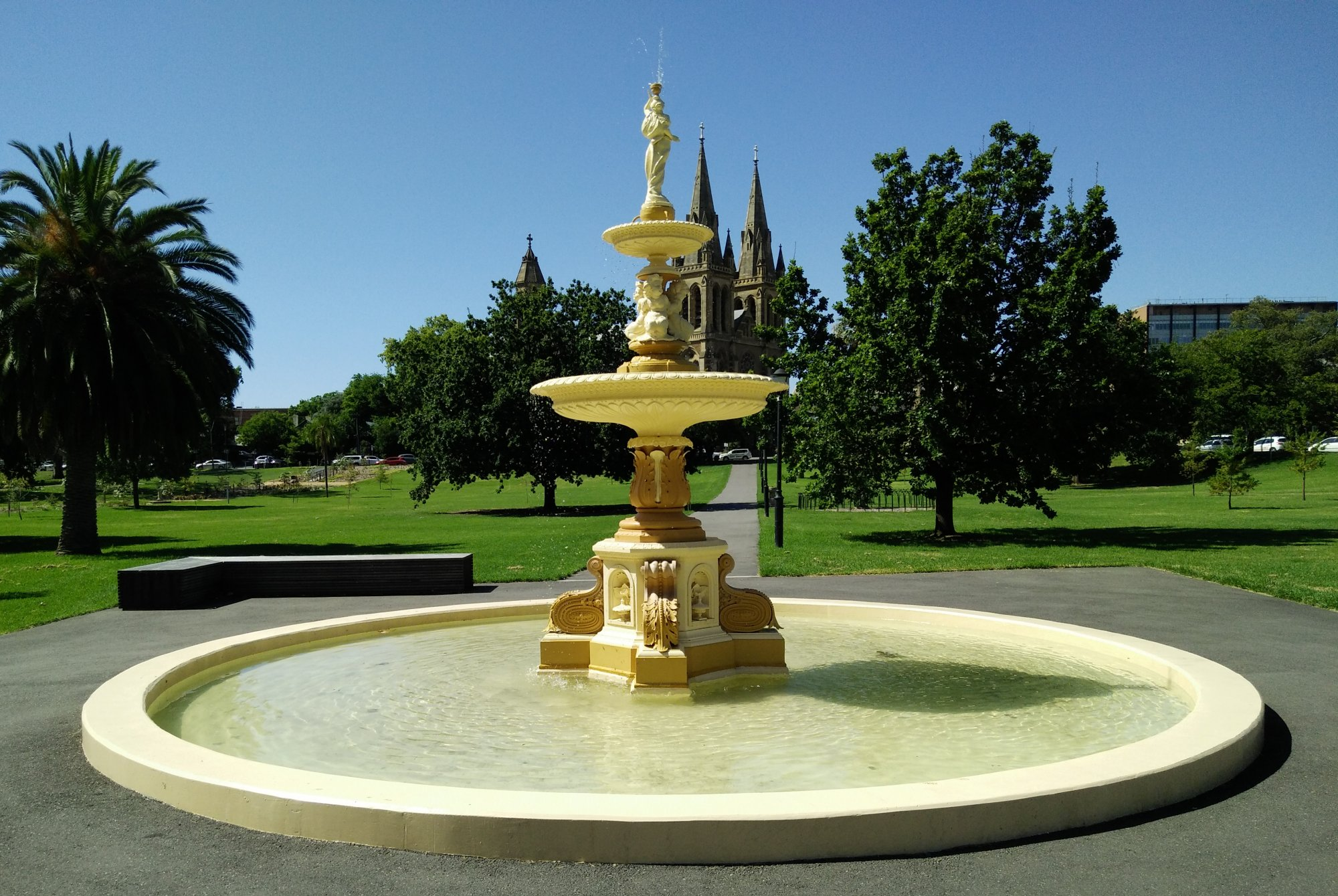 Creswell Gardens Fountain, (Adelaide Park Lands)